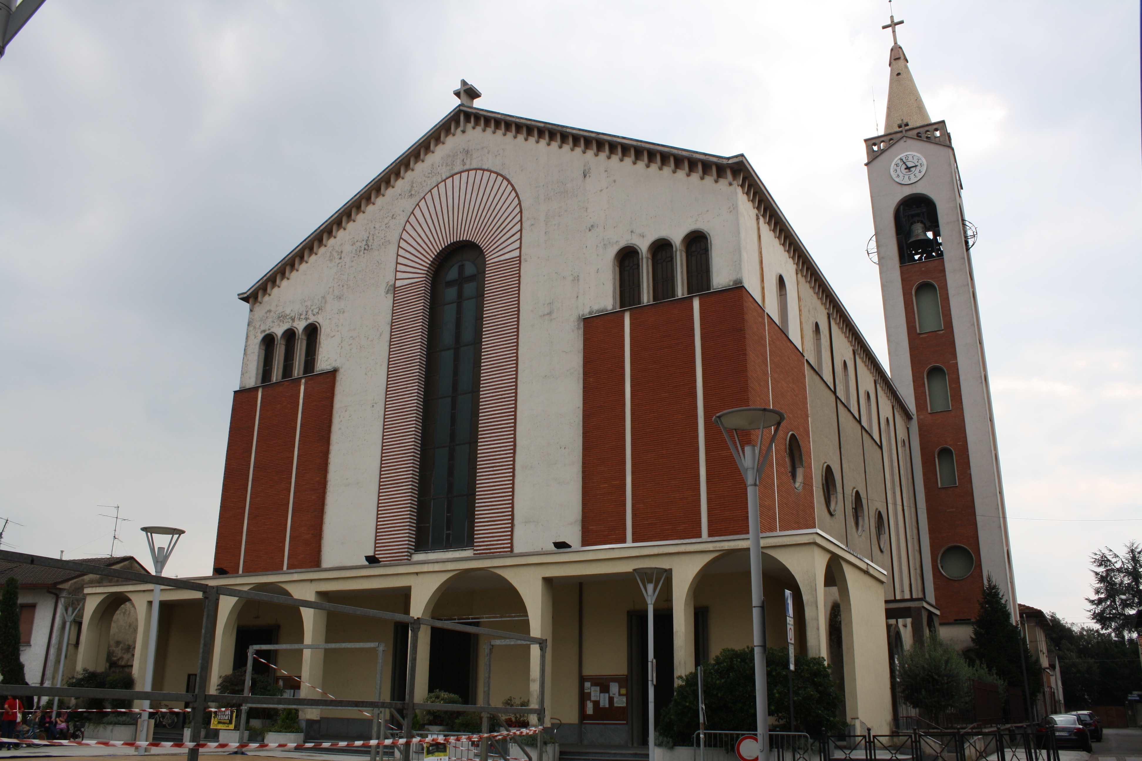 Chiesa di San Mauro abate This is a photo of a monument which is part of cultural heritage of Italy.